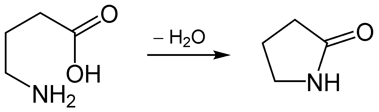 Bildung von γ-Butyrolactam